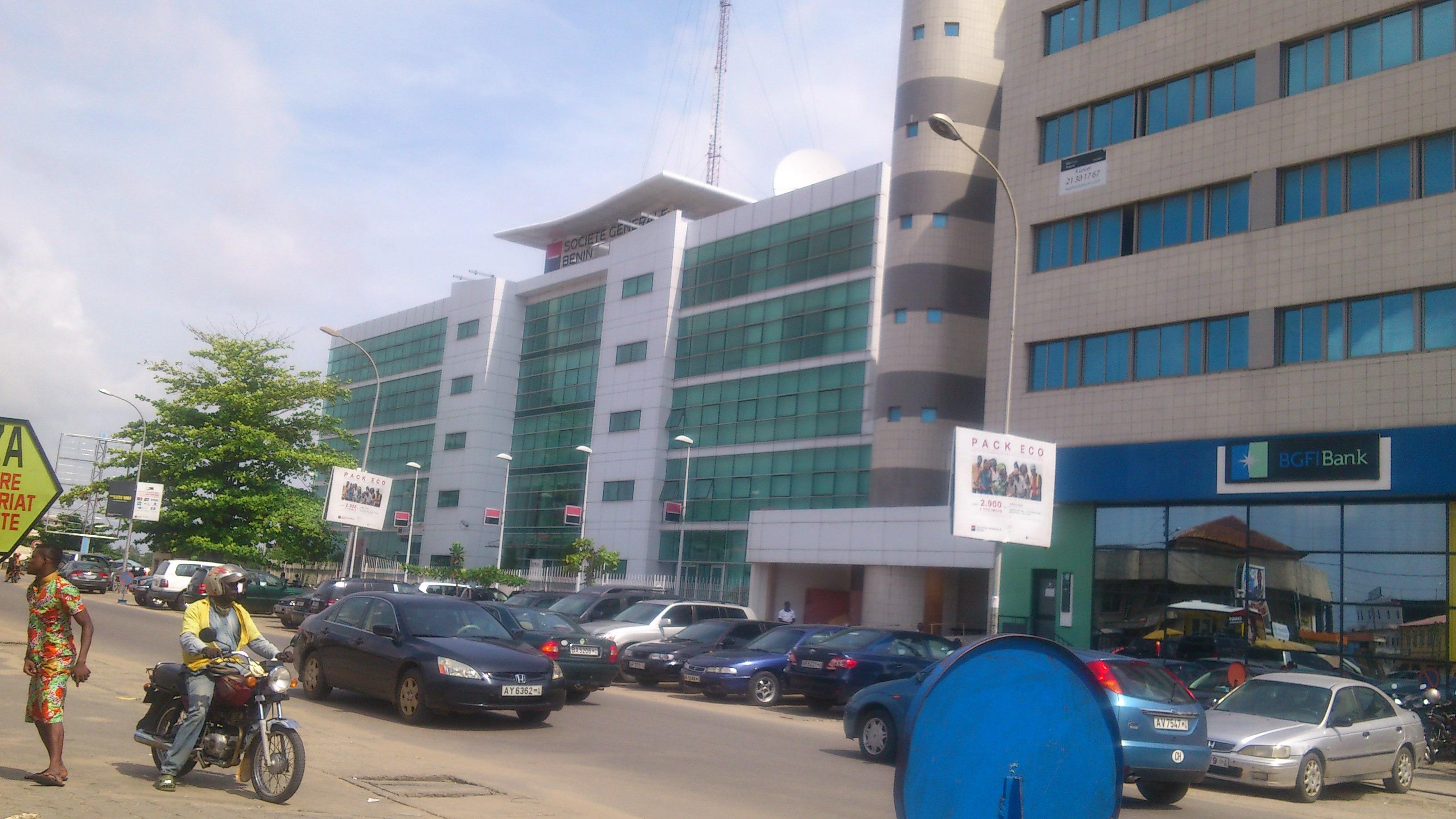 Quartier Ganhi de Cotonou (Bénin)